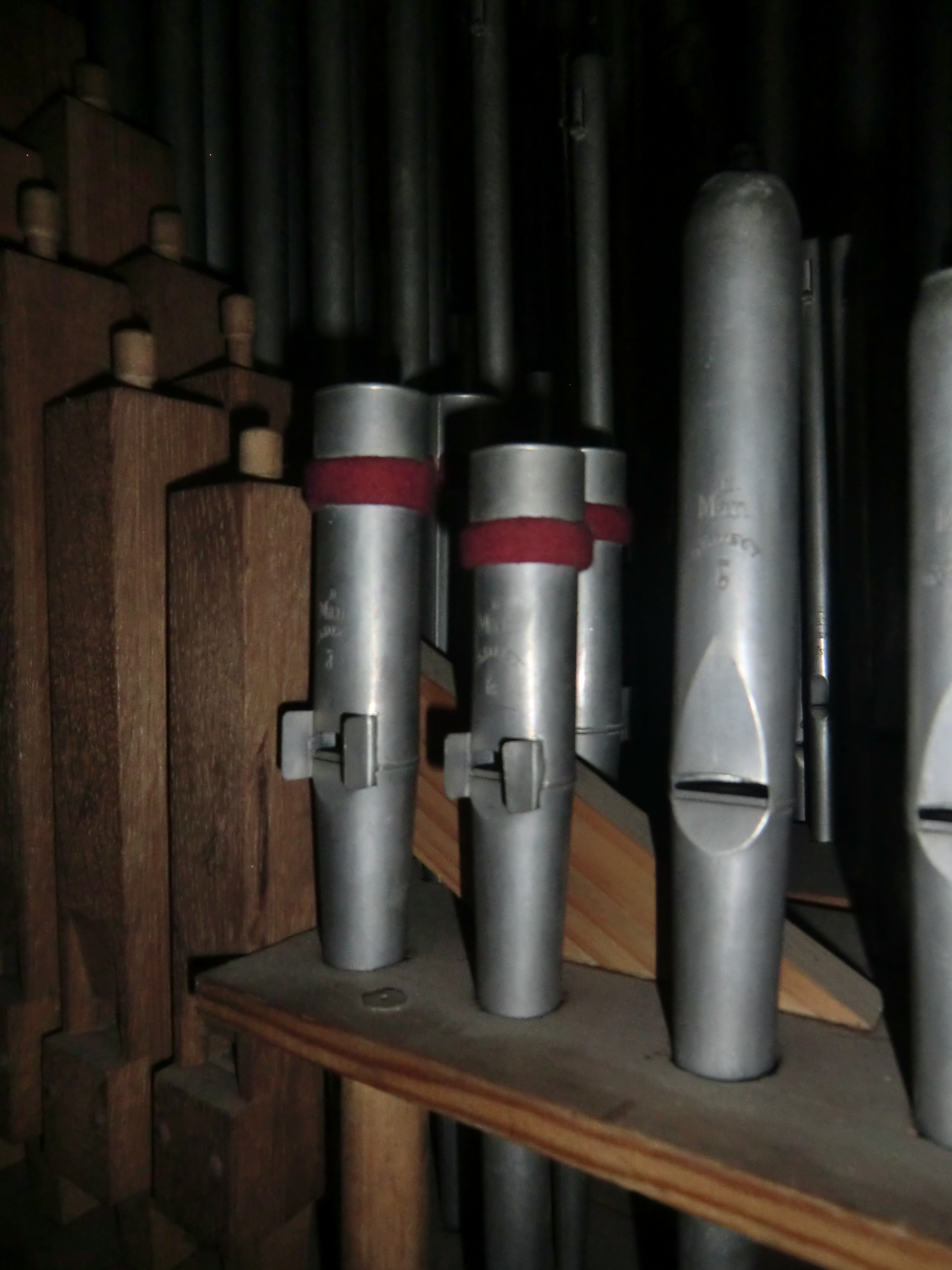 Orgelbauer Carl Horn: Pfeifen eines "Gedeckt 8´" (spitze Oberlabien)